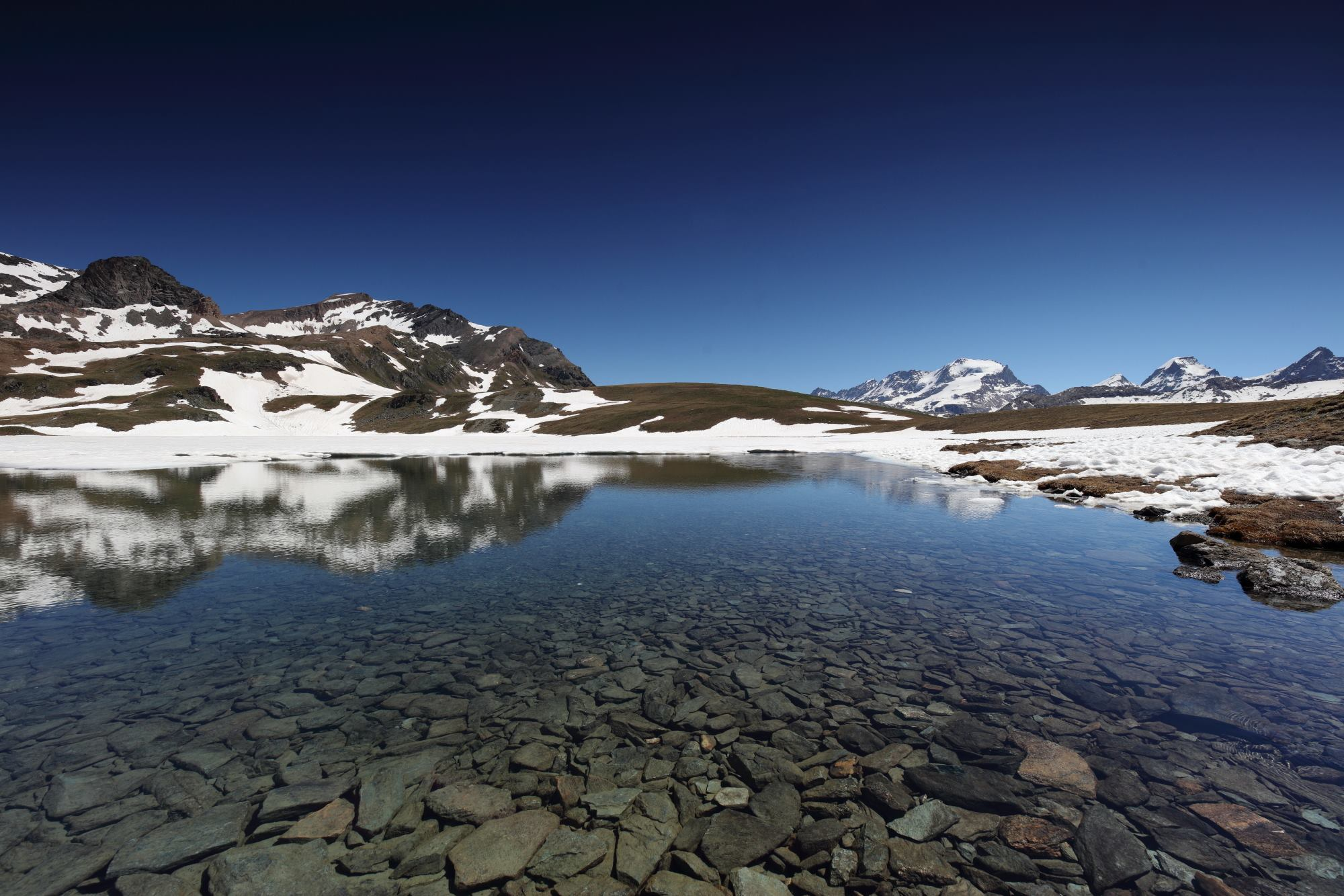 Parco nazionale del Gran Paradiso (Q847690)